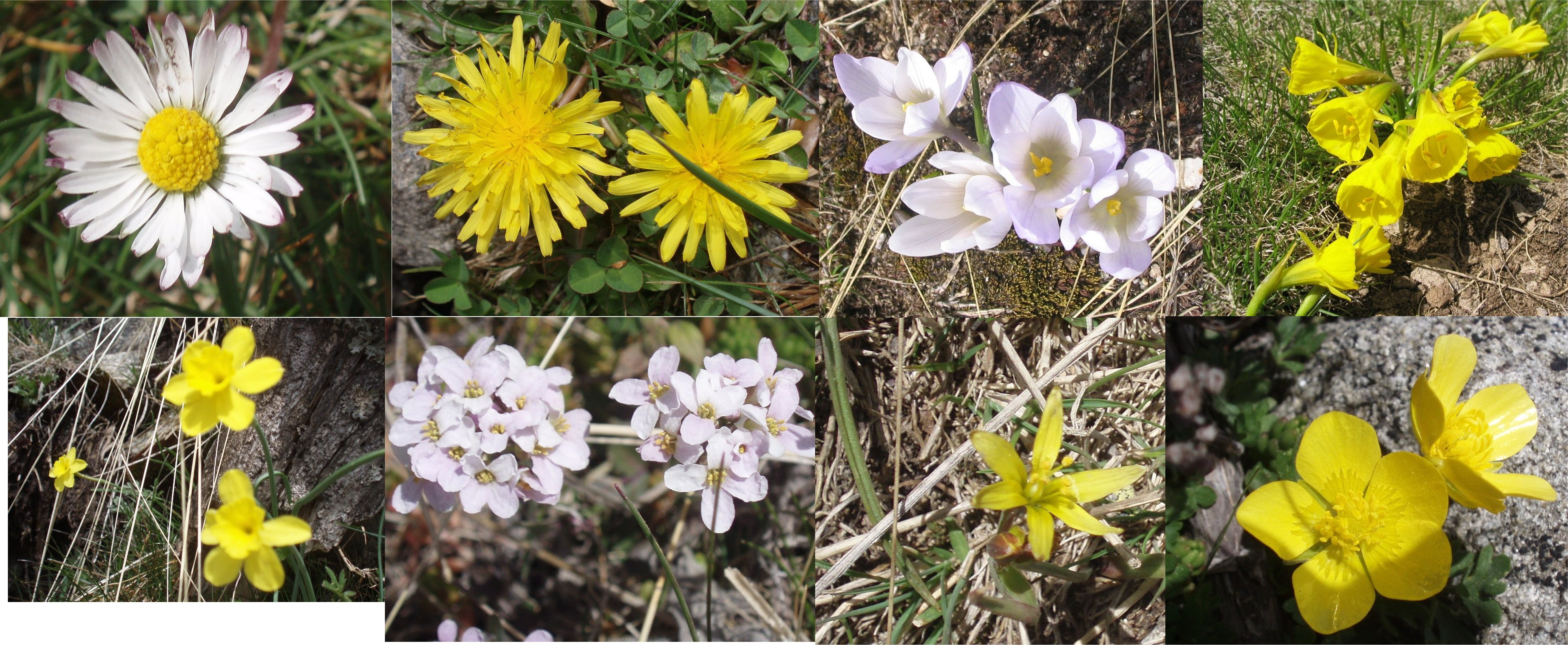 Flores de la Sierra de Guadarrama (centro de España).